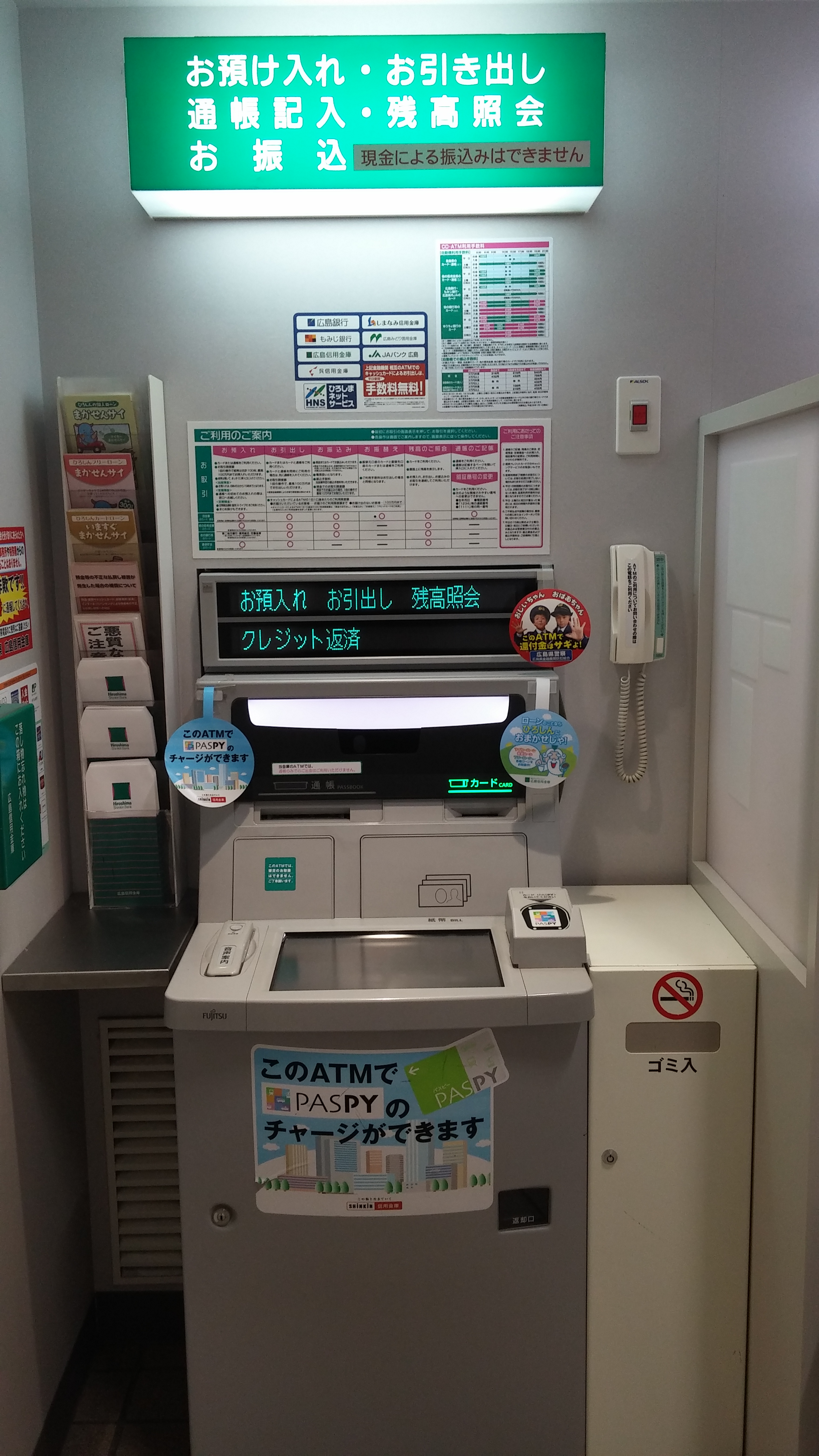 広島信用金庫 広島駅新幹線口 PASPY対応ATM